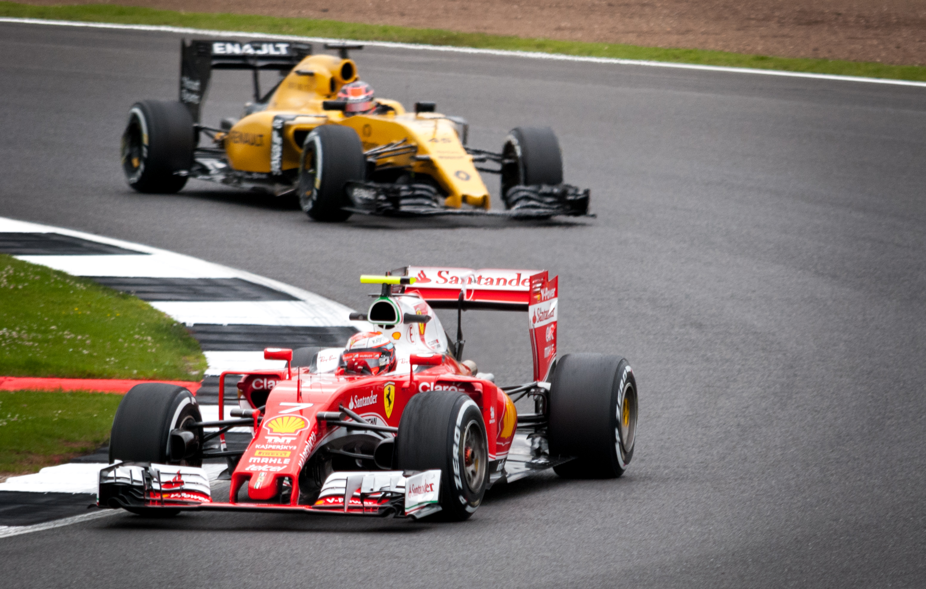 Kimi Räikkönen - Ferrari